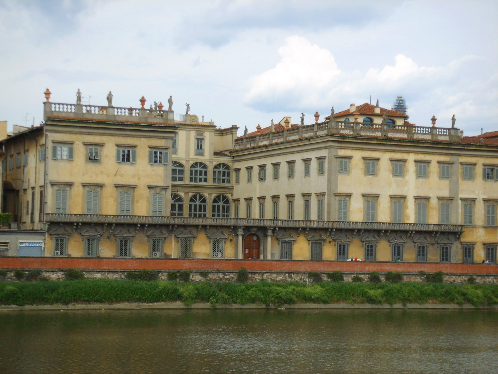 Palazzo Corsini, Florence, Italy